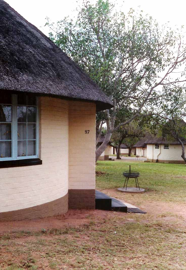 Ënnerkonft am Krügerpark